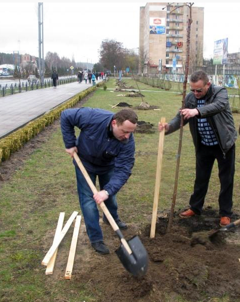 під час висадки саку у м Кузнецовськ